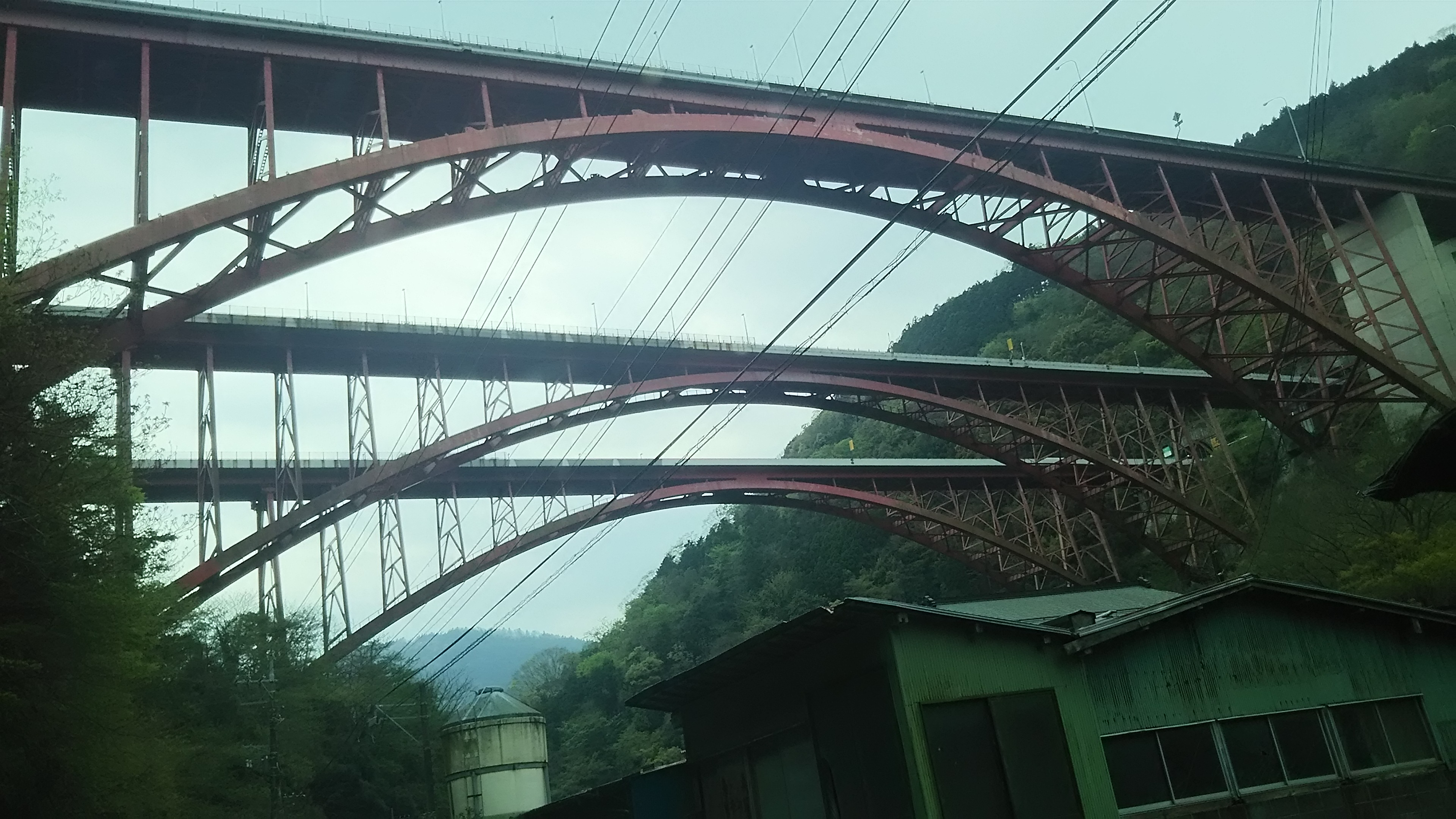 神奈川県山北町にある東名高速道路の皆瀬川橋